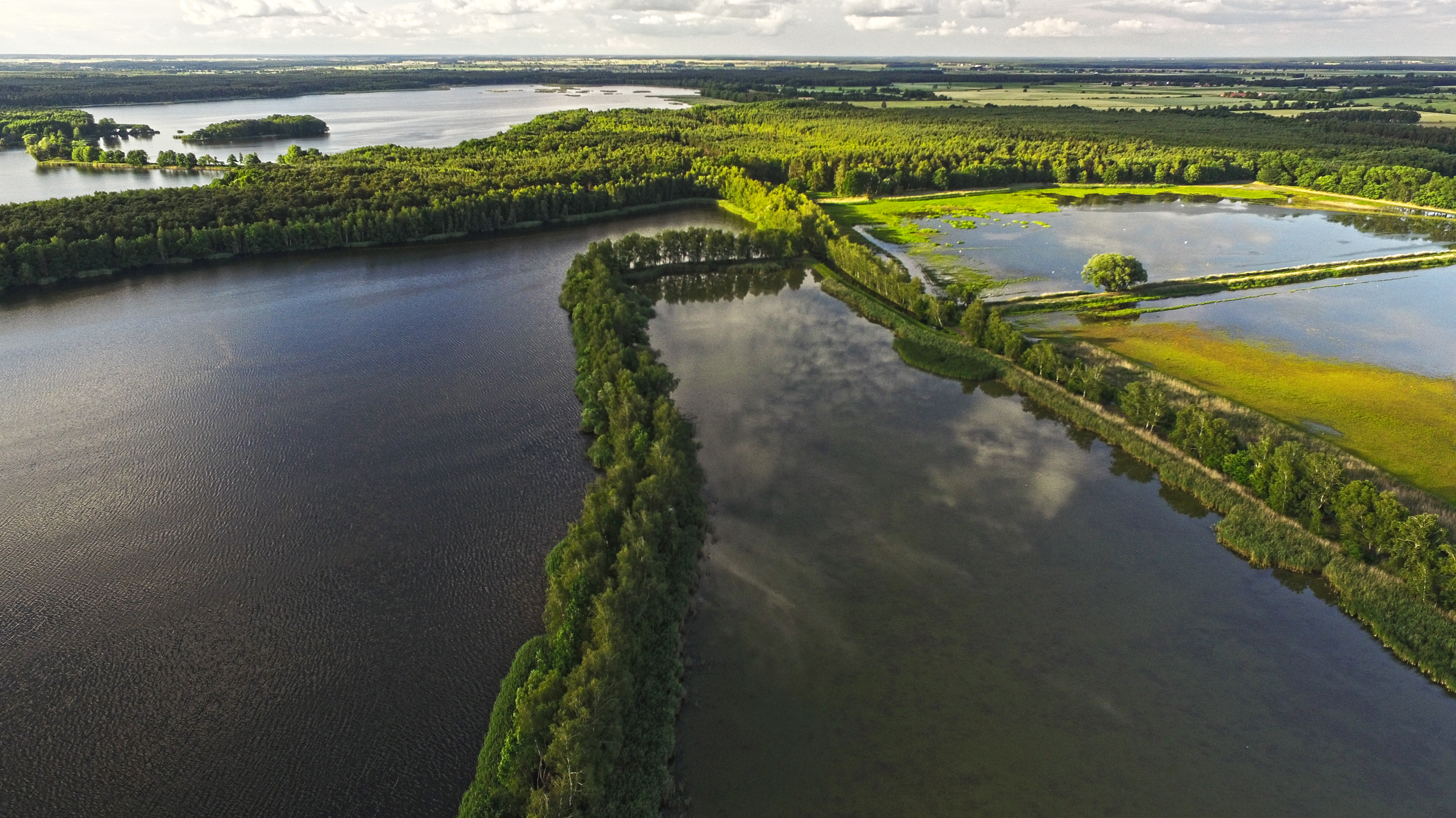 Zdjęcie przedstawia panoramę na stawy milickie z lotu dronem.